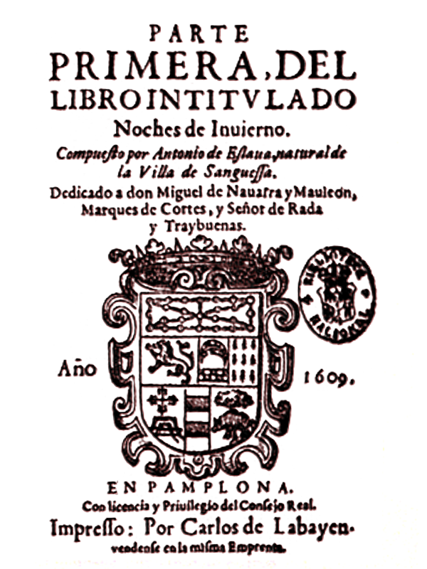 Portada del libro Noches de invierno de Antonio Eslava (1609)